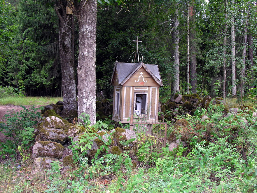 Koplytėlė Jonaičių k., Jonaičių miške, Mažeikių raj., Tirkšlių sen. Foto: Algirdas, 2006 m. rugpjūčio 2 d., Lietuva